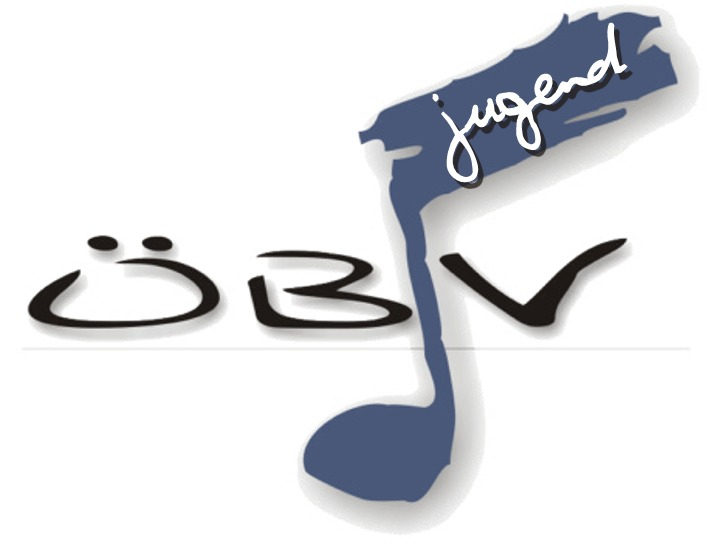 Logo der Österreichischen Blasmusikjugend